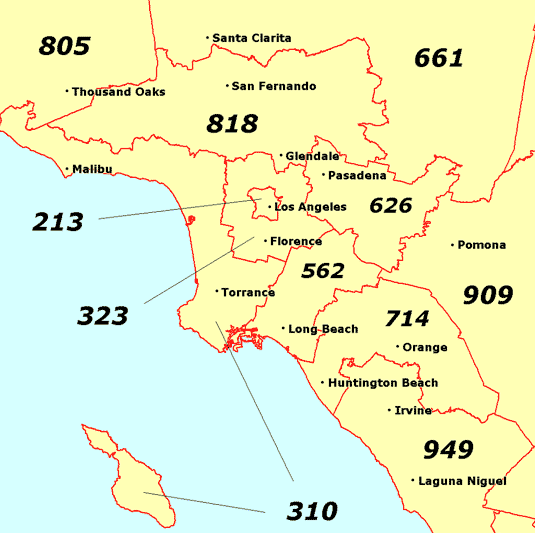 Los Angeles area codes